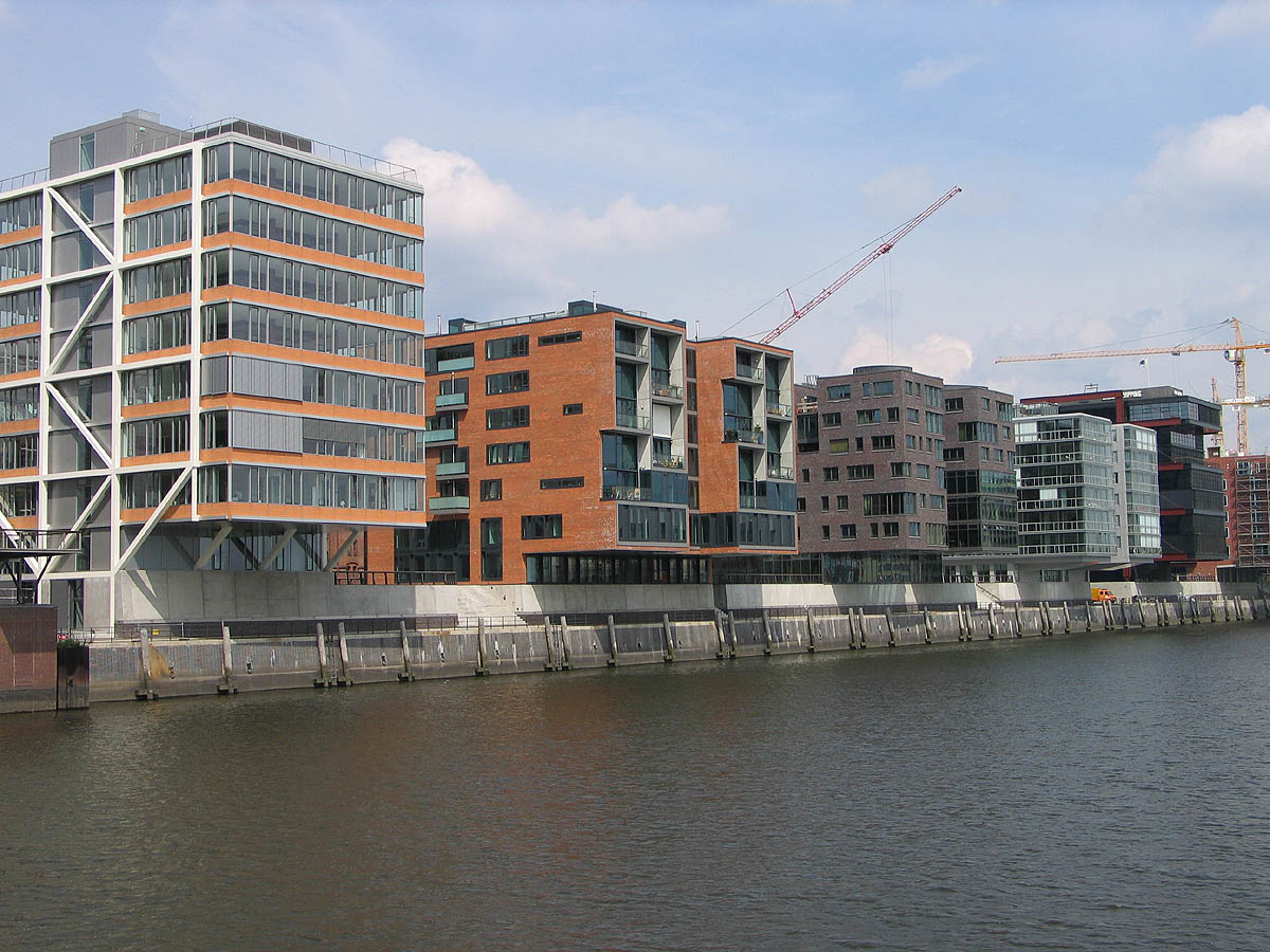 Neubauten am Sandtorkai, Hafencity, Hamburg, Deutschland This is a photograph of an architectural monument.